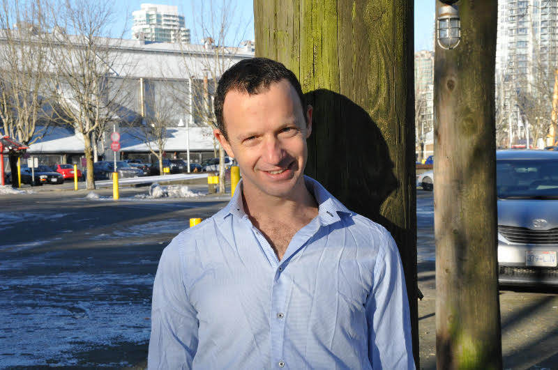 עידן כהן כריאוגרף ישראלי